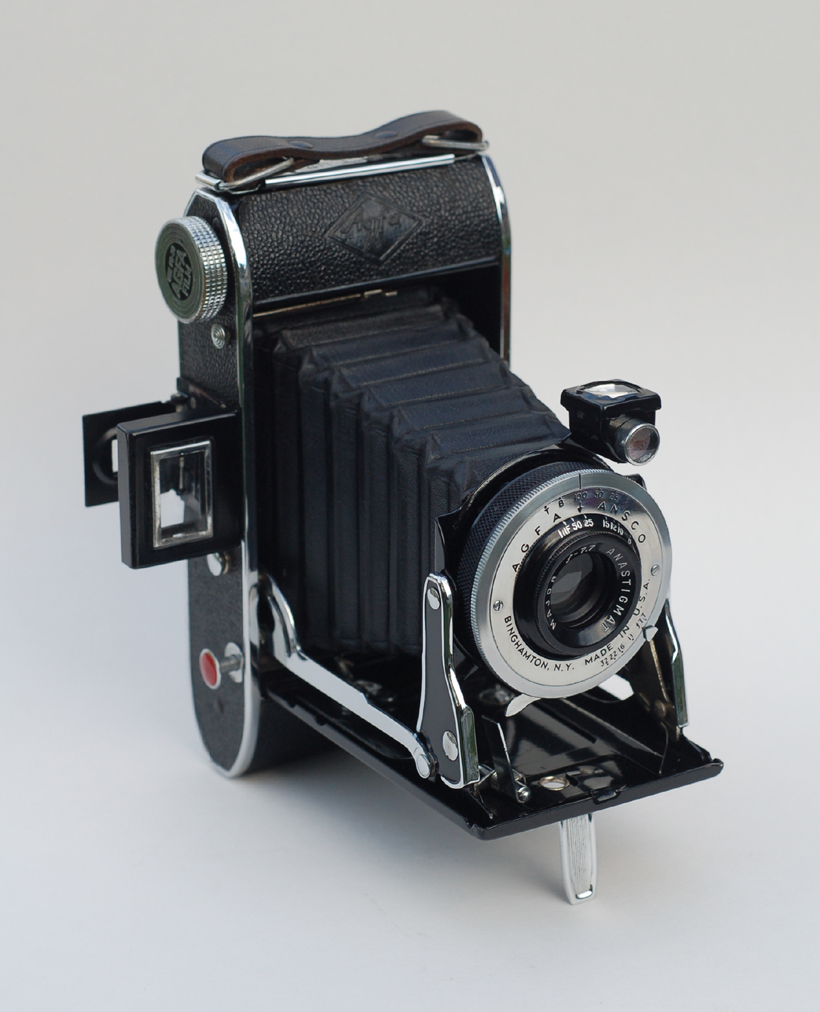 aparat fotograficzny Agfa-Ansco PB20 Major